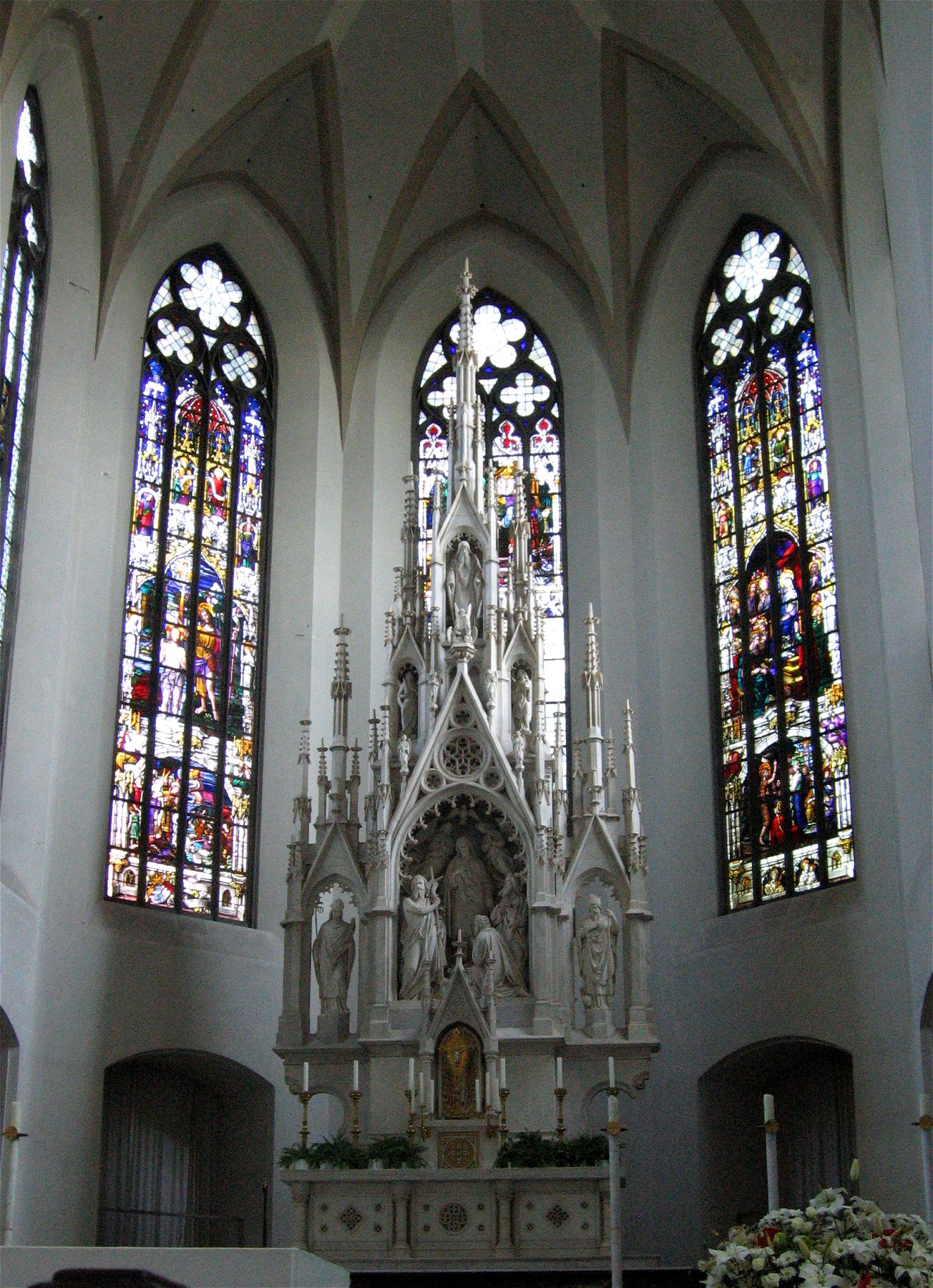 St. Johann Baptist, München-Haidhausen